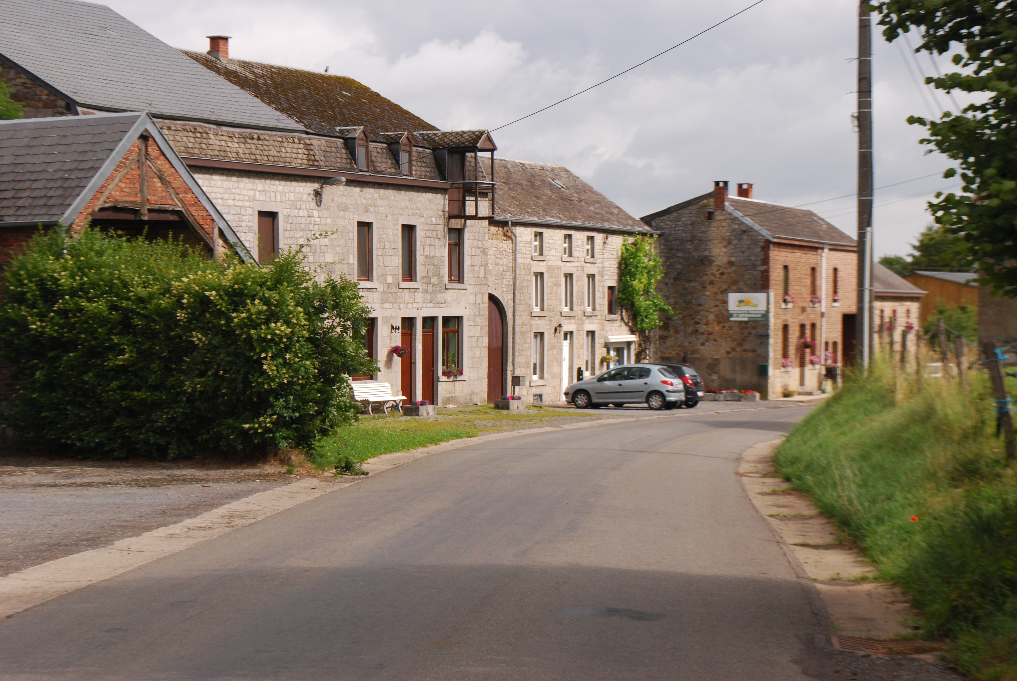 Vue de Morville.